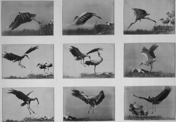 Etude du vol de la cigogne par Ottomar Anschütz (1884).